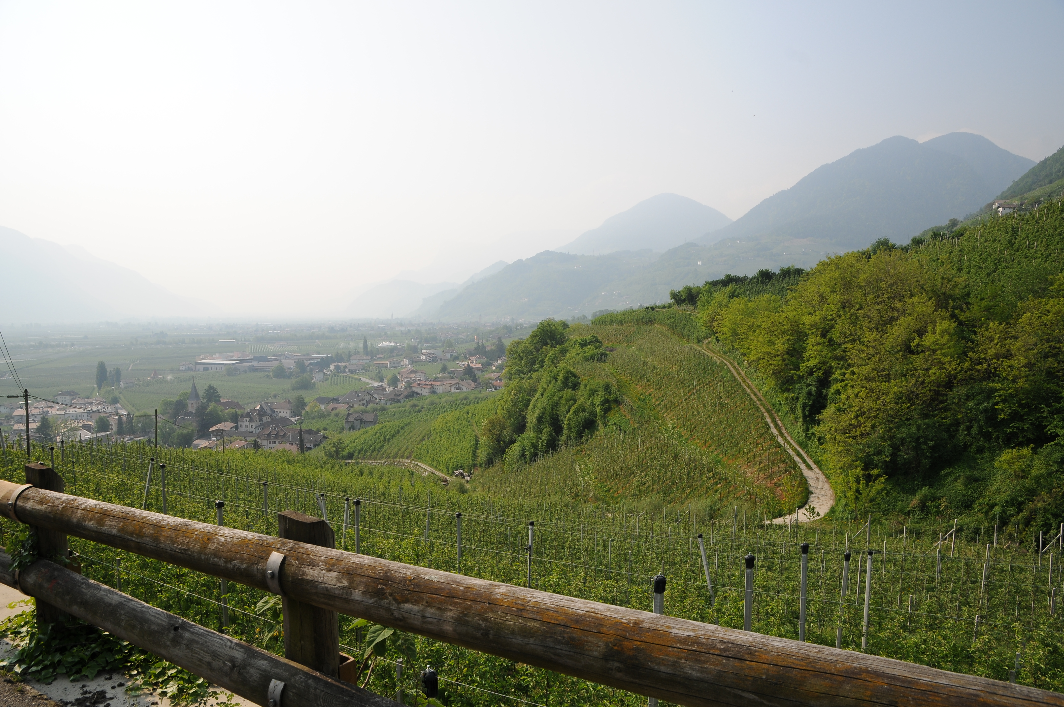 Blick von der Via Sankt Anna auf Tscherms und das Etschtal.